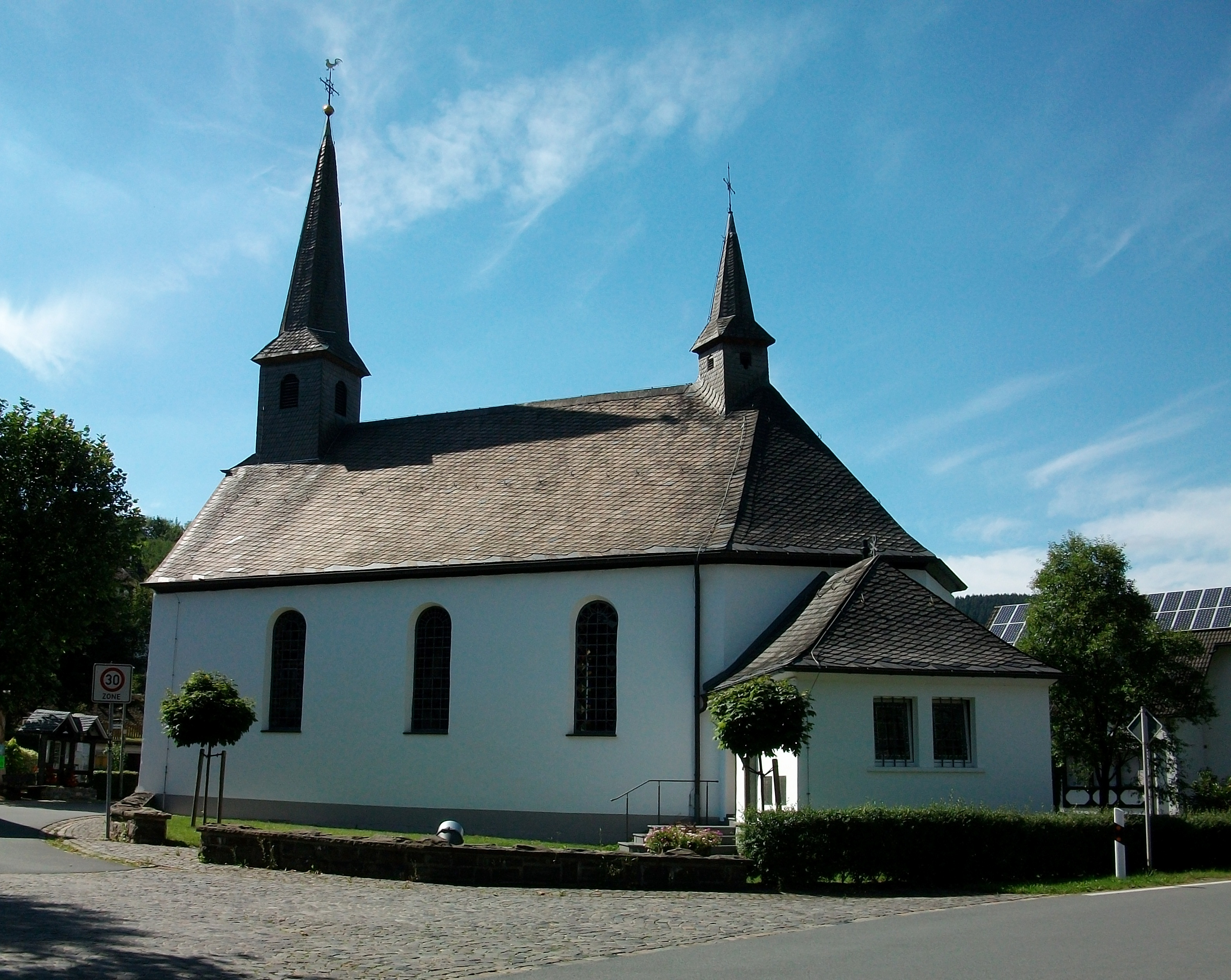 St. Hubertus Kirche, Eslohe (Germany)